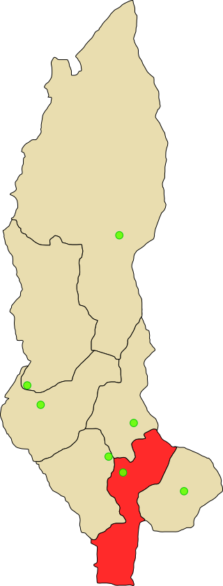 Provincia de Chachapoyas en departamento Amazonas